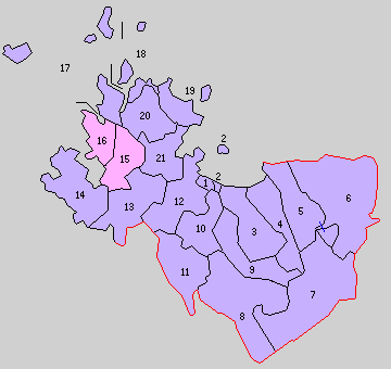 佐賀県東松浦郡の町村制時点の町村。